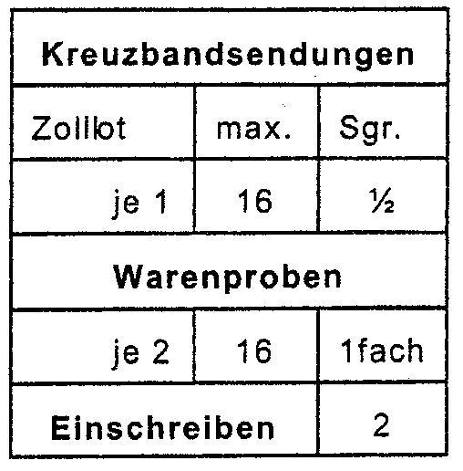 Die neuen Tarife für Drucksachen (Kreuzbandsendungen)etc